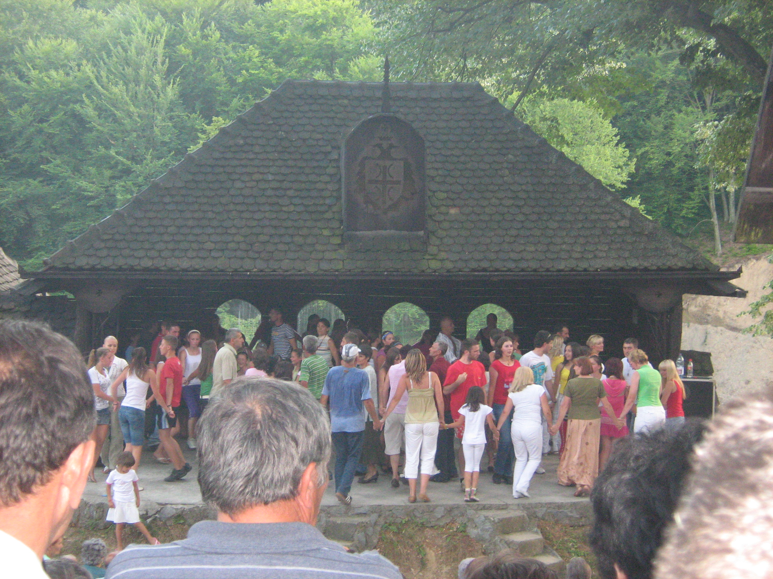 Играње за дукат испред цркве